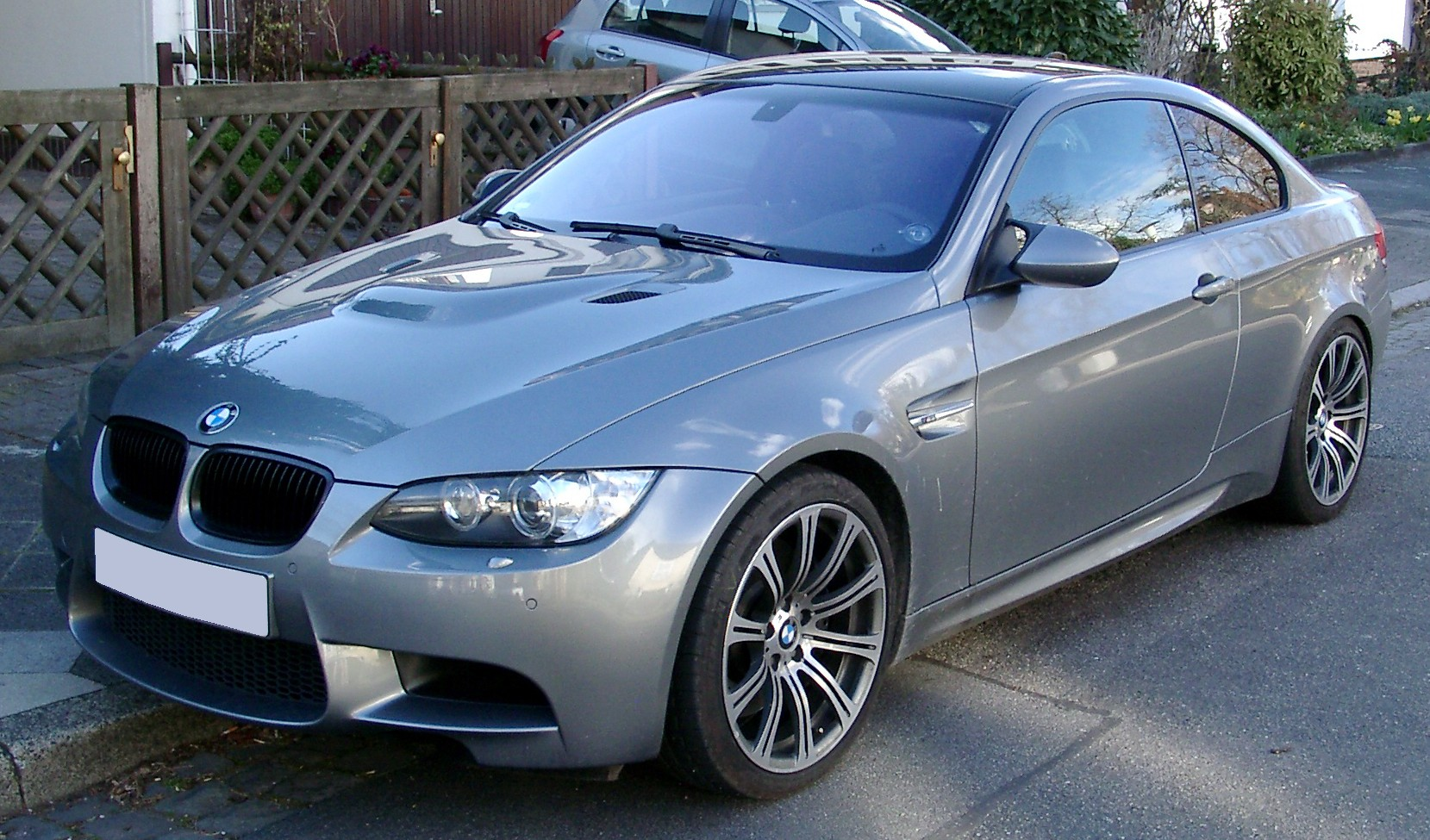 BMW E92 (M3 Coupé)